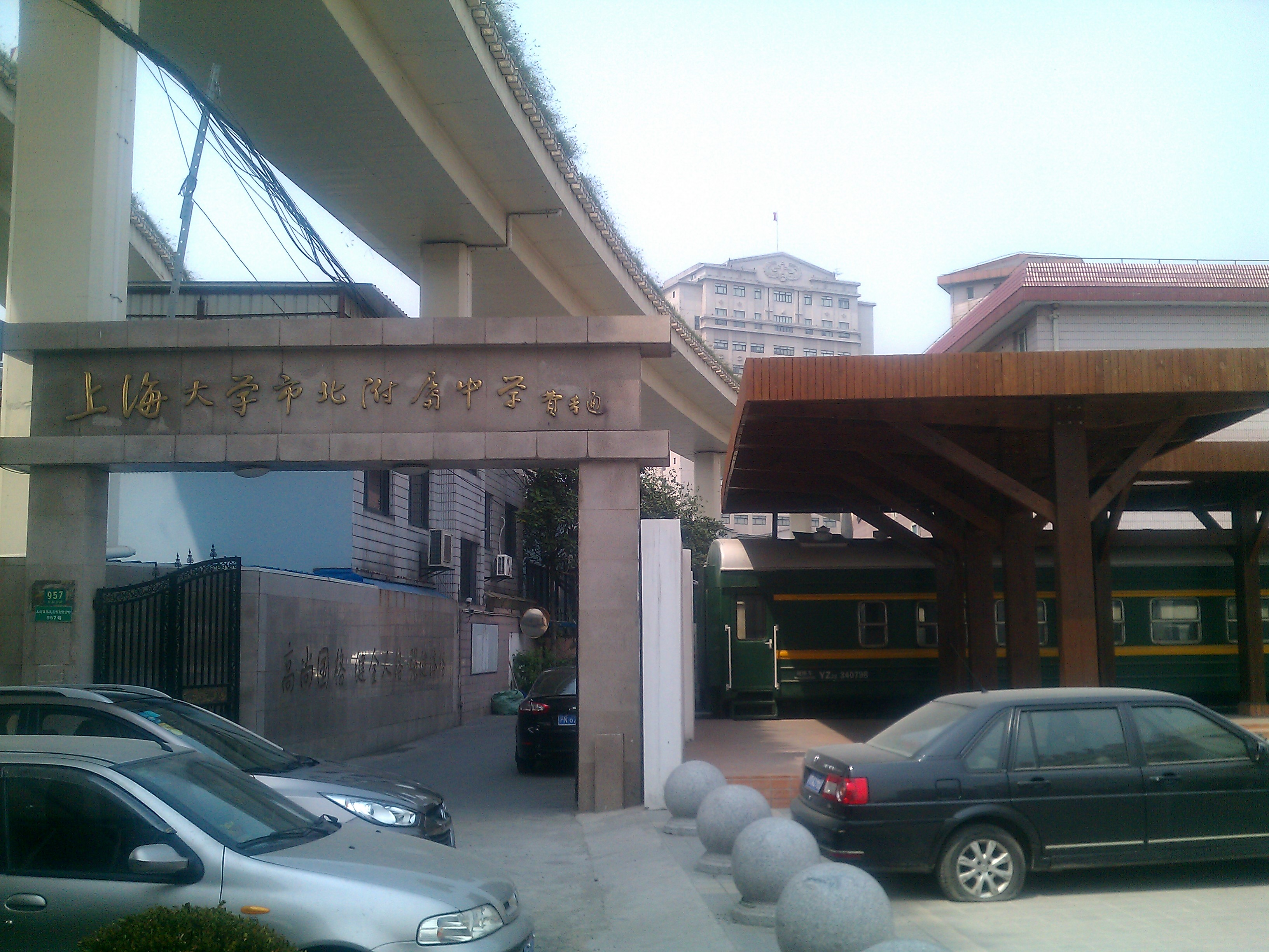 上海大学附属市北中学即原上海铁路职工子弟学校高中部